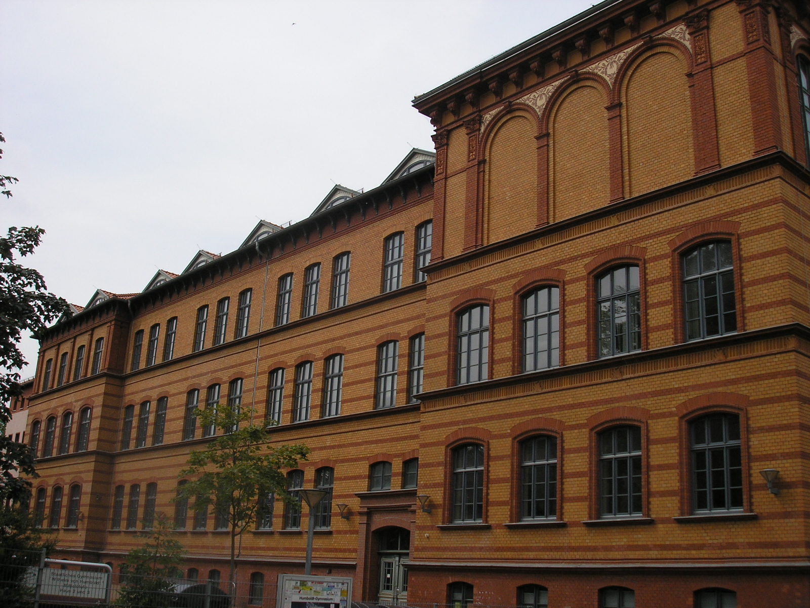 Das Humboldtgymnasium in Nordhausen (Thüringen).